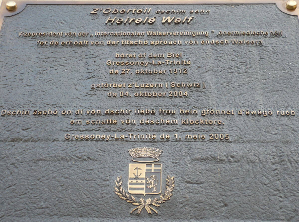 Gedenktafel auf "Greschoneitisch" (lokaler Walserdialekt)